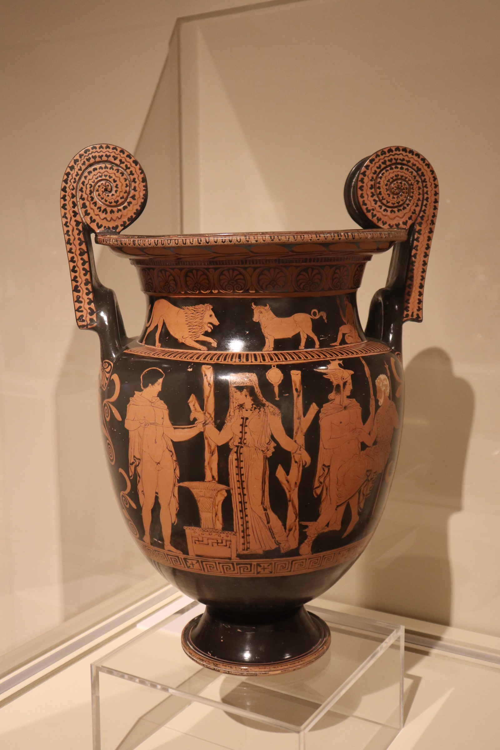 Cratere a volute, Gruppo del Pittore di Sisifo/Pittore delle Carnee